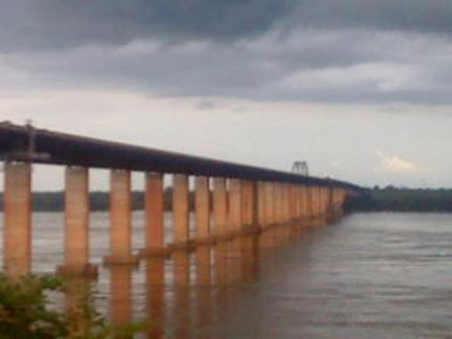 Foto da Ponte mista de Marabá